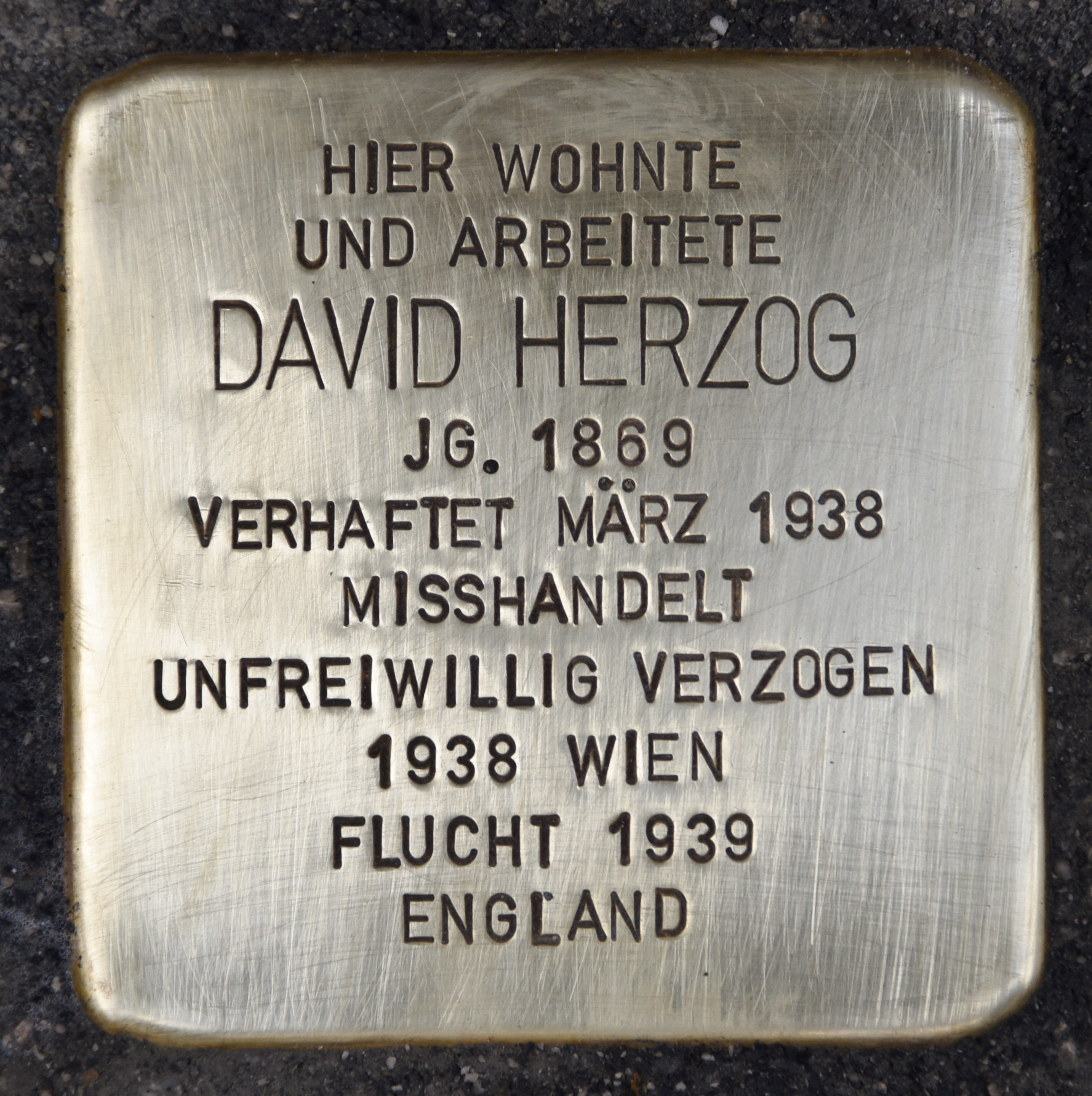 Stolperstein für David Herzog, Radetzkystr. 8